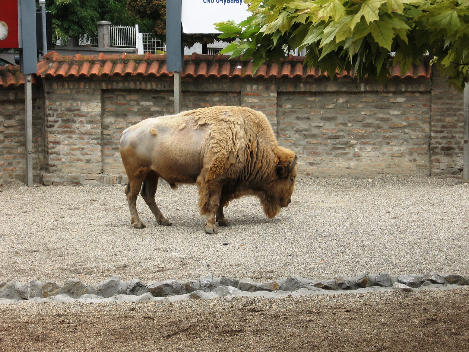 Bizon u beogradskom ZOO vrtu, jul 2011.